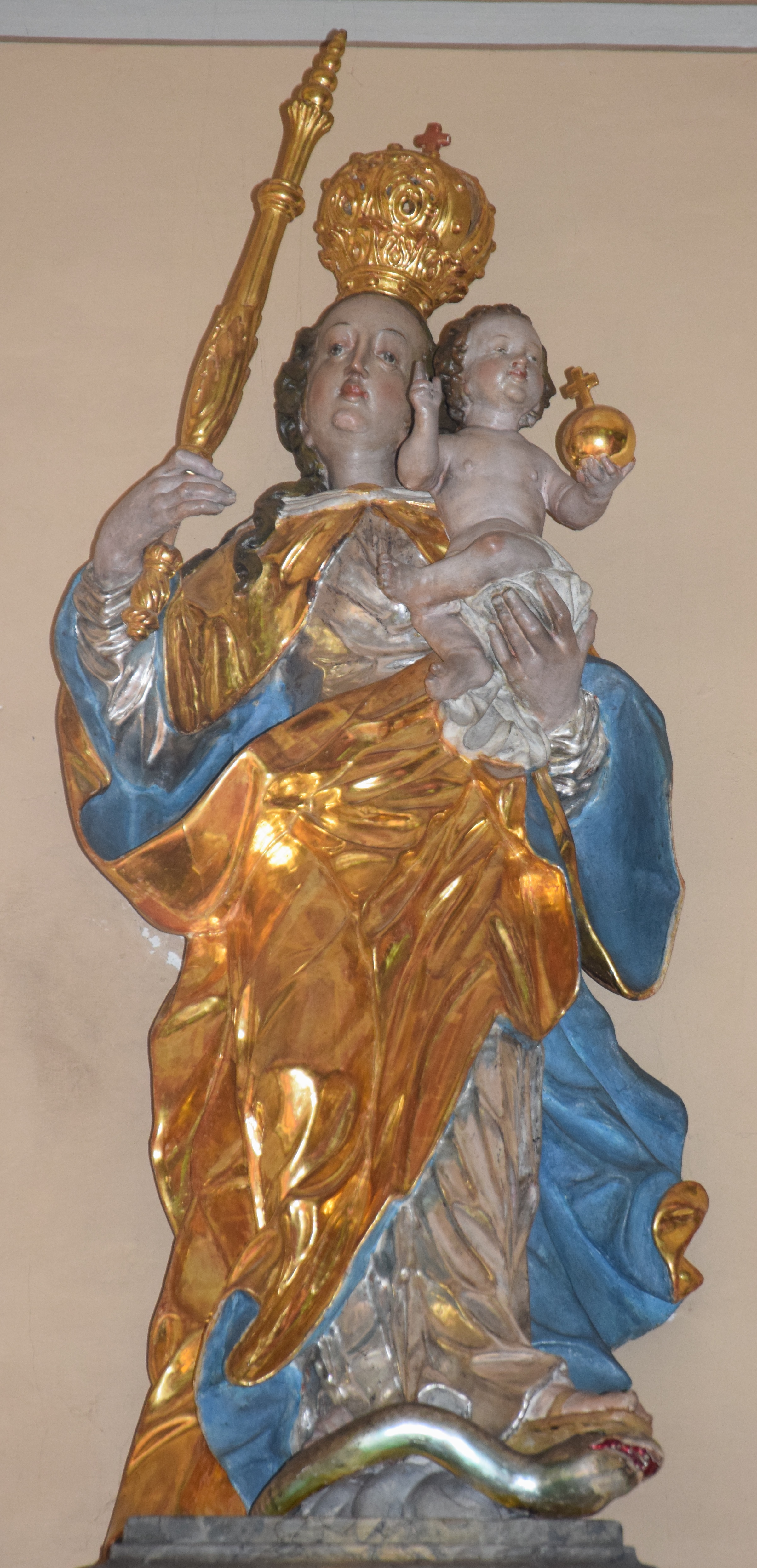 Hl. Joachim in der Filialkirche Mariä Geburt in Altenstadt (um 1720), ursprünglich in der Pestkapelle in Illereichen.